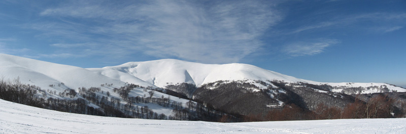 Вид на полонину (хребет) Боржава, Закарпатье